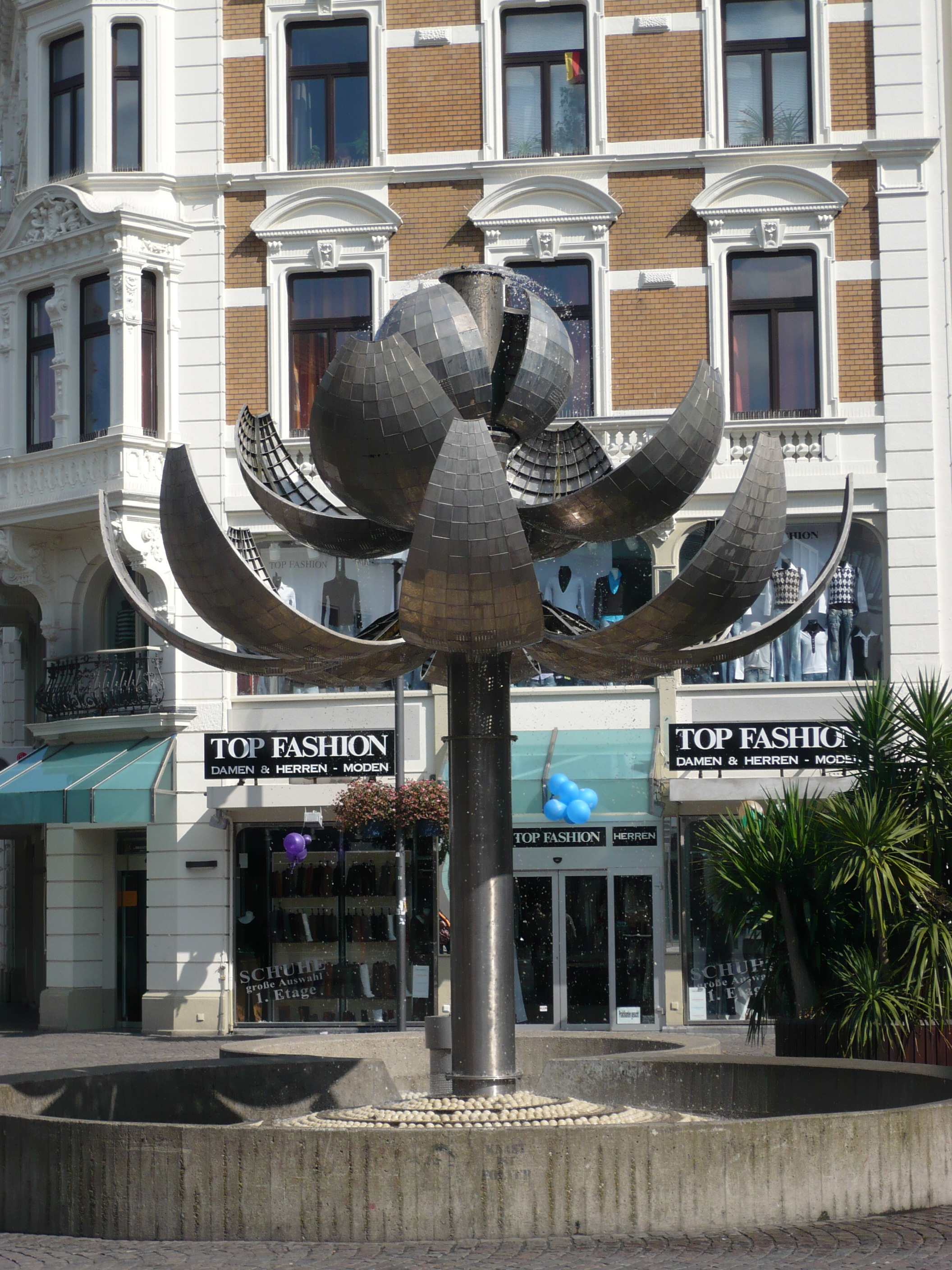 Kugelbrunnen in Aachen von Albert Sous, 1977. 1. Preis im Wettbewerb zur Neugestaltung der Fußgängerzone 1976